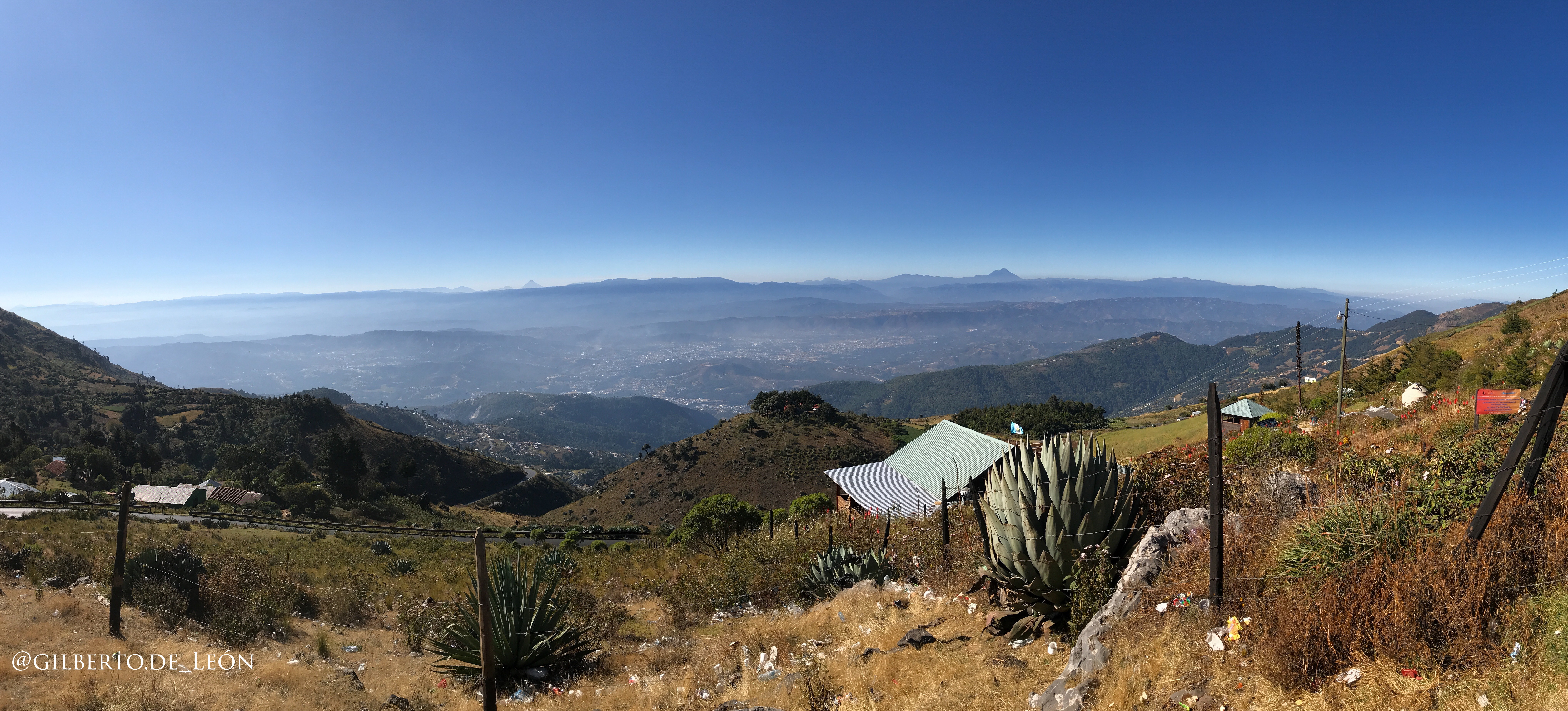 Huehuetenango desde el mirador Juan Dieguez Olaverri en donde podrá visualizar las cumbres más lejanas de La Sierra de los Cuchumatanes, el volcán Tacaná, Tajumulco, Santa María, Atitlán, entre otros. Se encuentra a los 12 kilómetros de ascenso hacia Todos Santos Cuchumatán, Huehuetenango